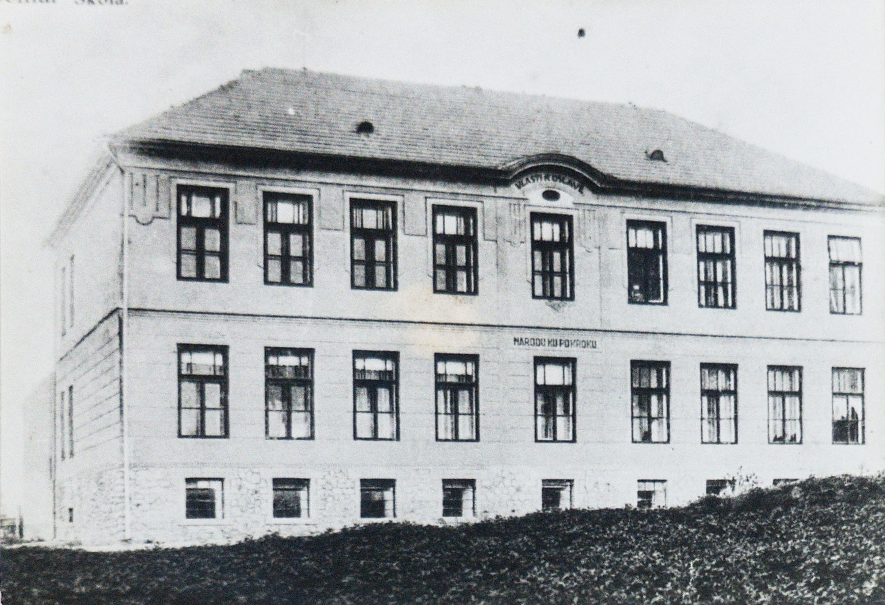 Budova školy vystavěná v letech 1930